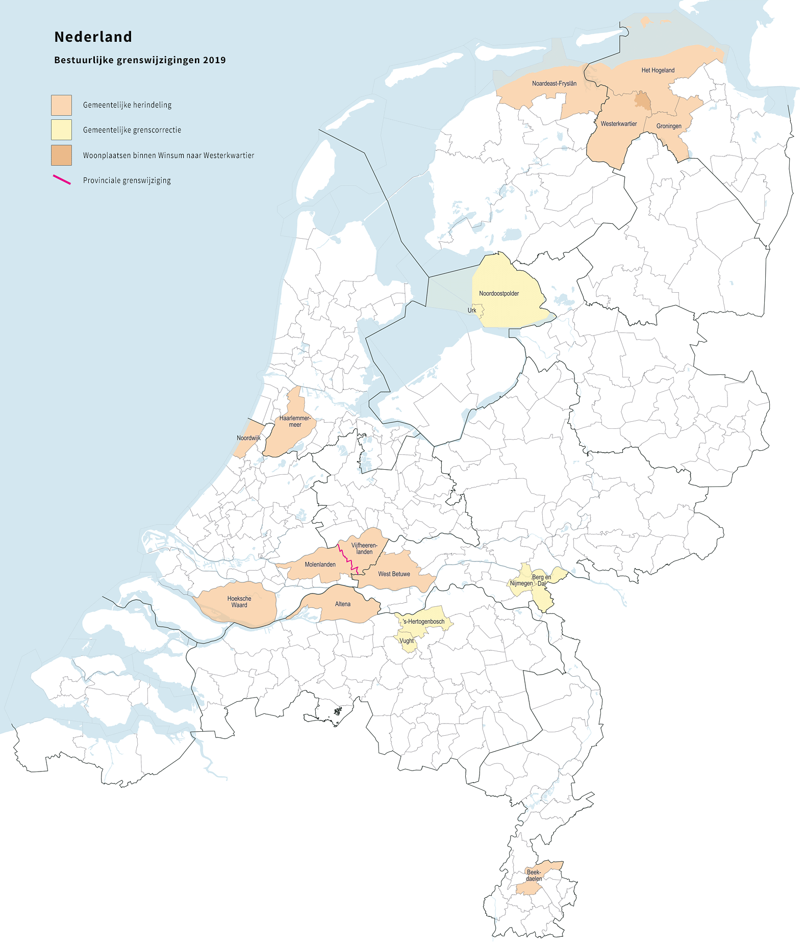 Overzichtskaart van de bestuurlijke wijzigingen in Nederland per 1-1-2019. Samengesteld door Jan-Willem van Aalst, met dank aan Metatopos.